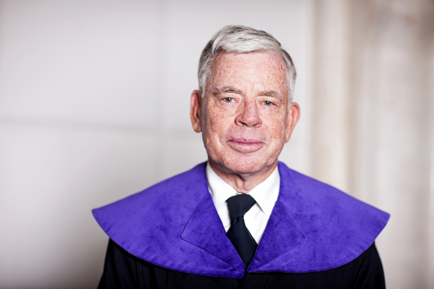 Dr. Hans Georg Ruppe, Mitglied des österreichischen Verfassungsgerichtshofs von 1999 bis 2012.